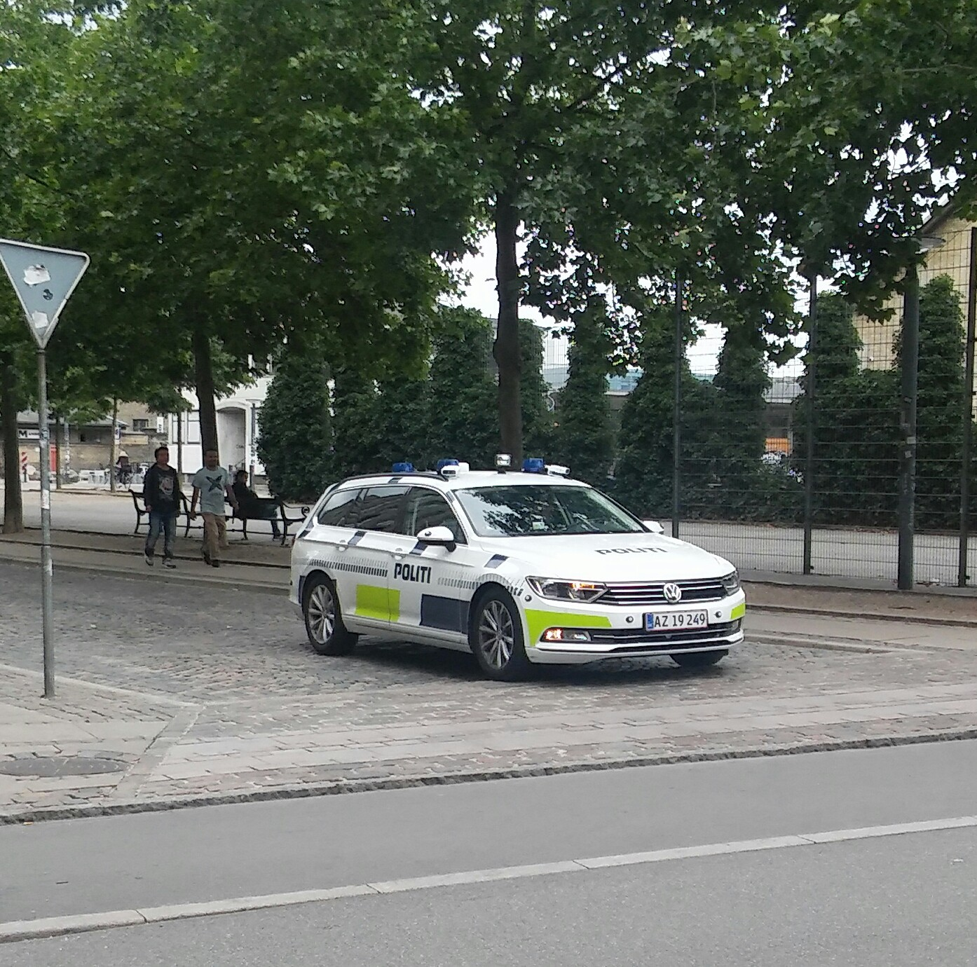 Volkswagen Passat B8 of the Politi in Copenhagen